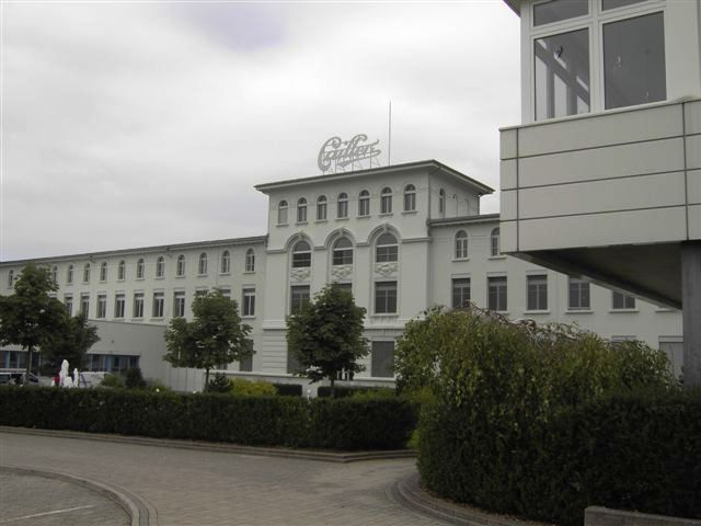 Cailler, Broc-fabrique, Schweiz